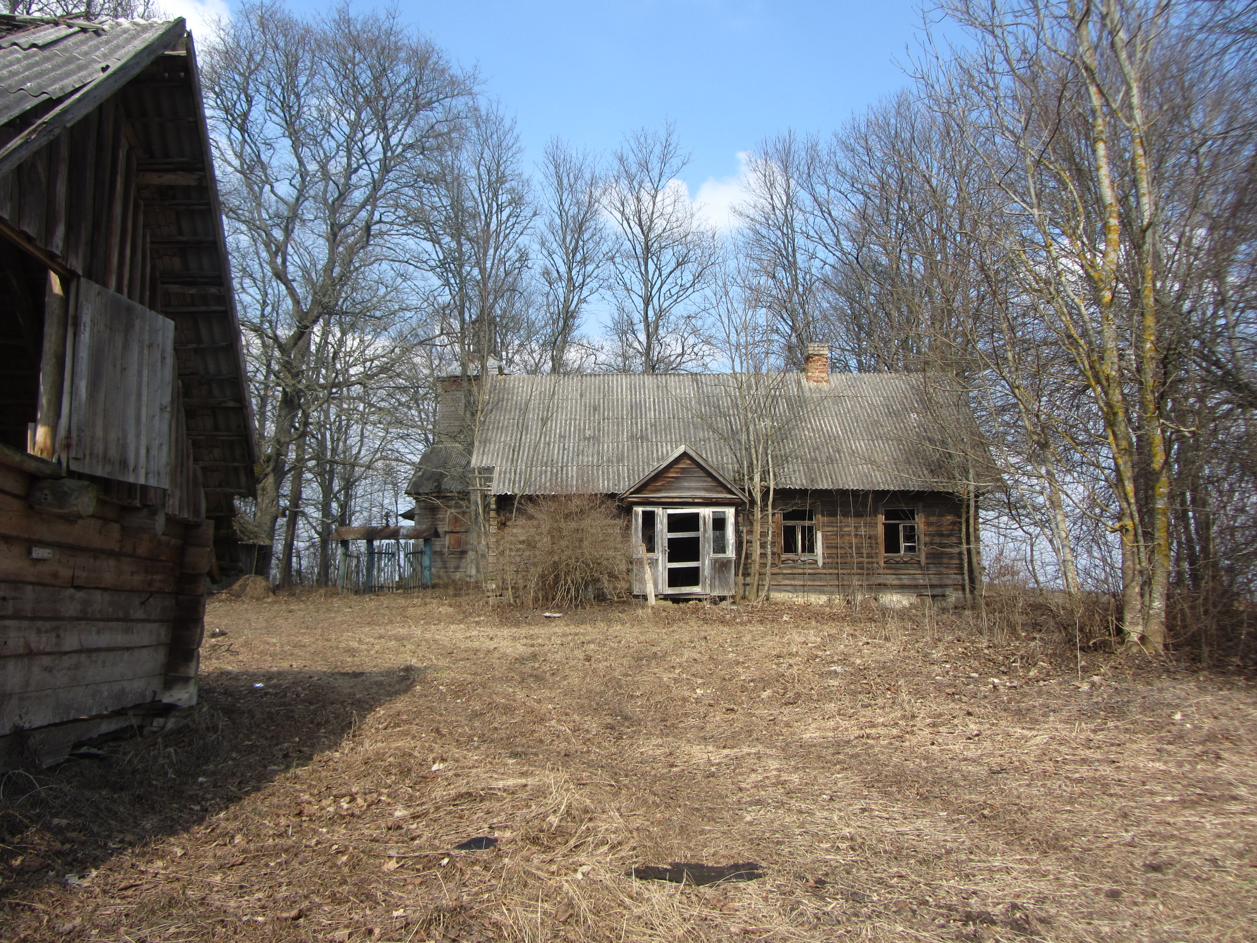 Aukštakalniai 30258, Lithuania